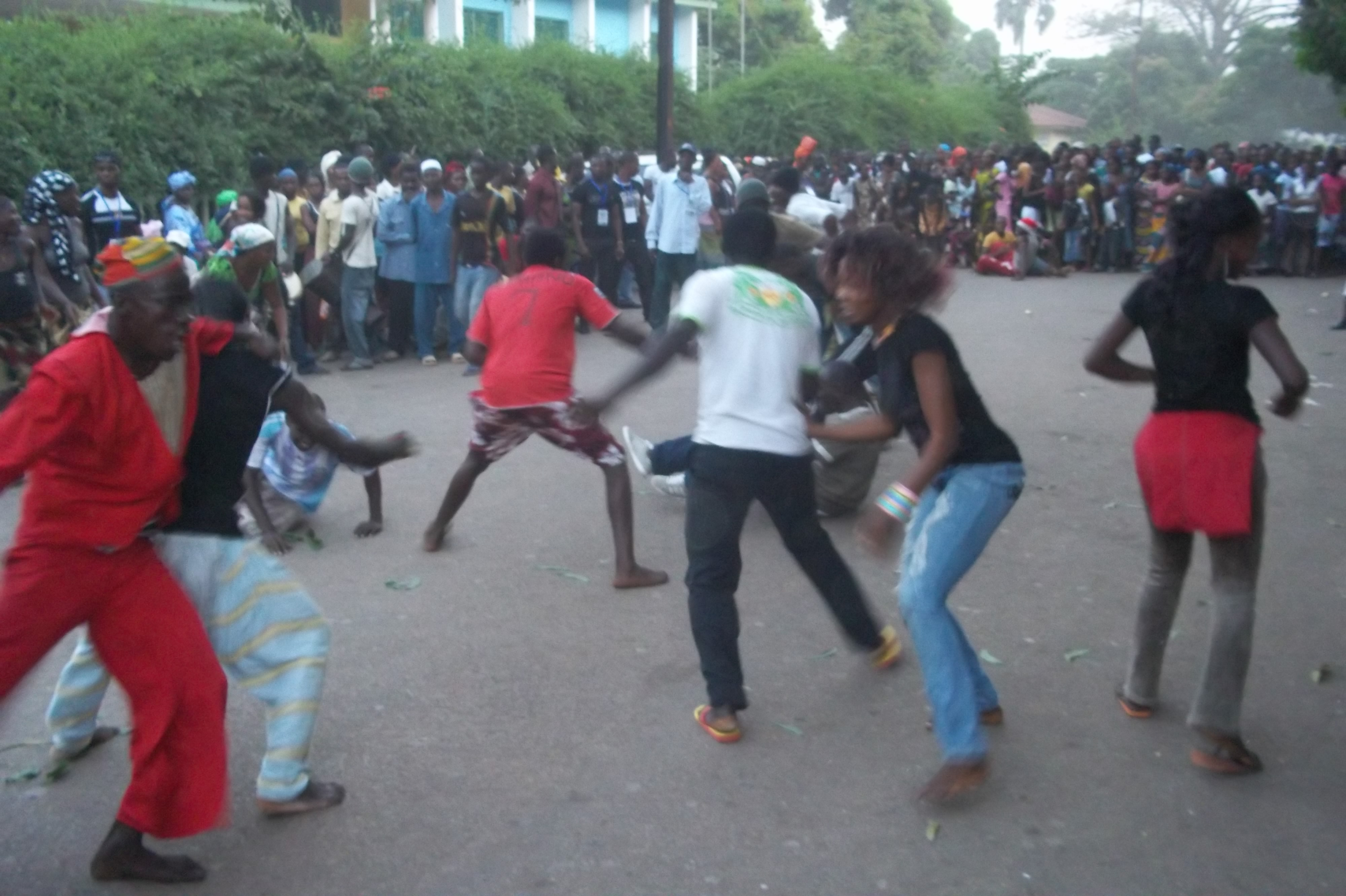 Démonstration de la danse Soli Fête Annuelle de la danse soli à Kindia, Guinée